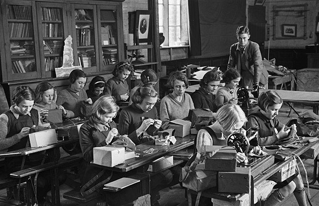 Teitl Cymraeg/Welsh title: Crefftwaith yn Ysgol yr Eglwys, y Drenewydd Ffotograffydd/Photographer: Geoff Charles (1909-2002) Dyddiad/Date: November 18, 1939 Cyfrwng/Medium: Negydd ffilm / Film negative Cyfeiriad/Reference: (gcc01171) Rhif cofnod / Record no.: 3472154 Rhagor o wybodaeth am gasgliad Geoff Charles yn Llyfrgell Genedlaethol Cymru Ceir mwy o ffotograffau o Gymru a'r Gororau adeg yr Ail Ryfel Byd ar wefan .uk More information about the Geoff Charles Collection at the National Library of Wales More photographs of Wales and the English border during the Second World War can be found at .uk